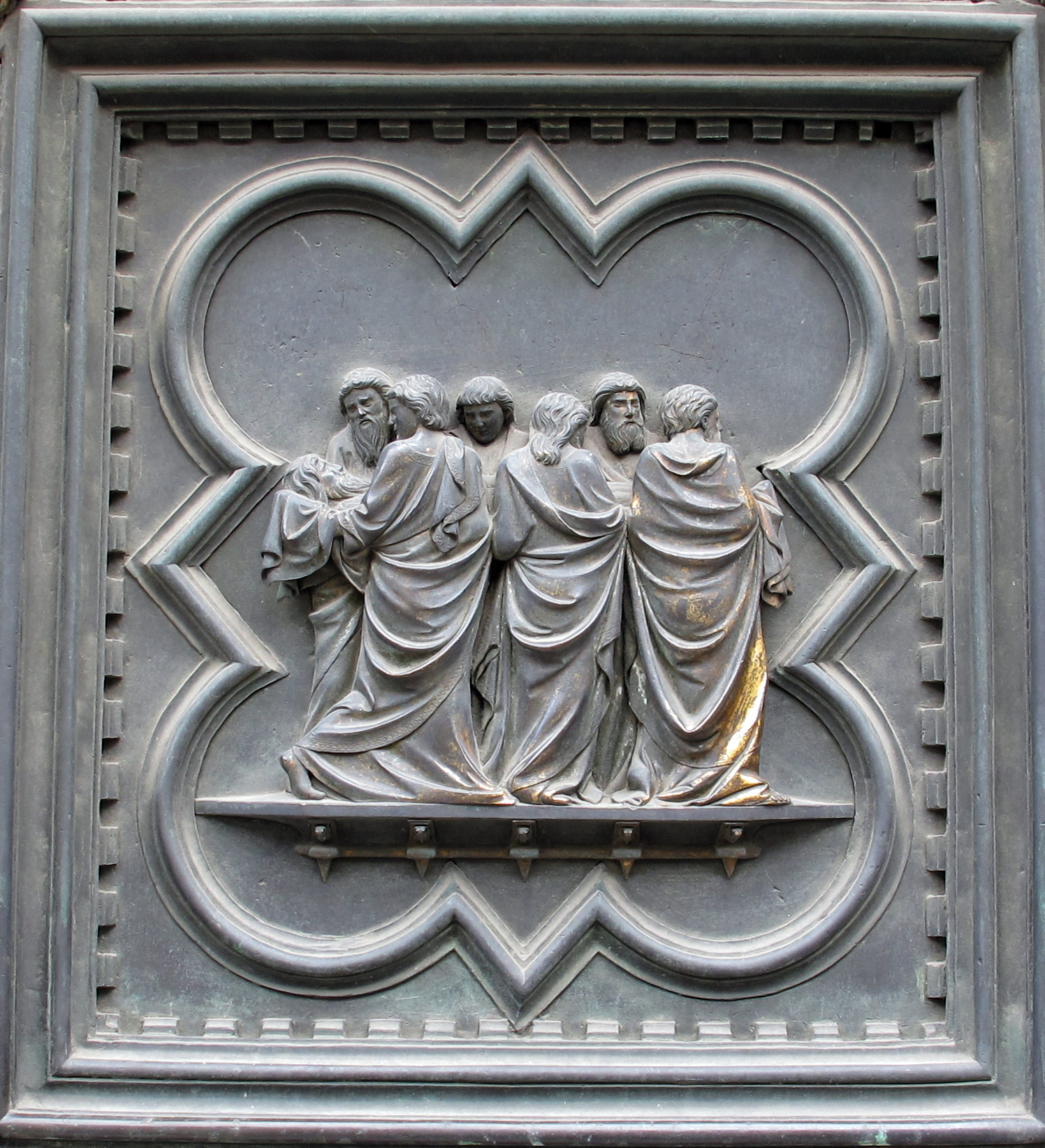 P. sud, 19, trasporto della testa di s. giovanni battista